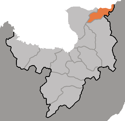 Map of Taehongdan, Ryanggang-do, DPRK, 2006